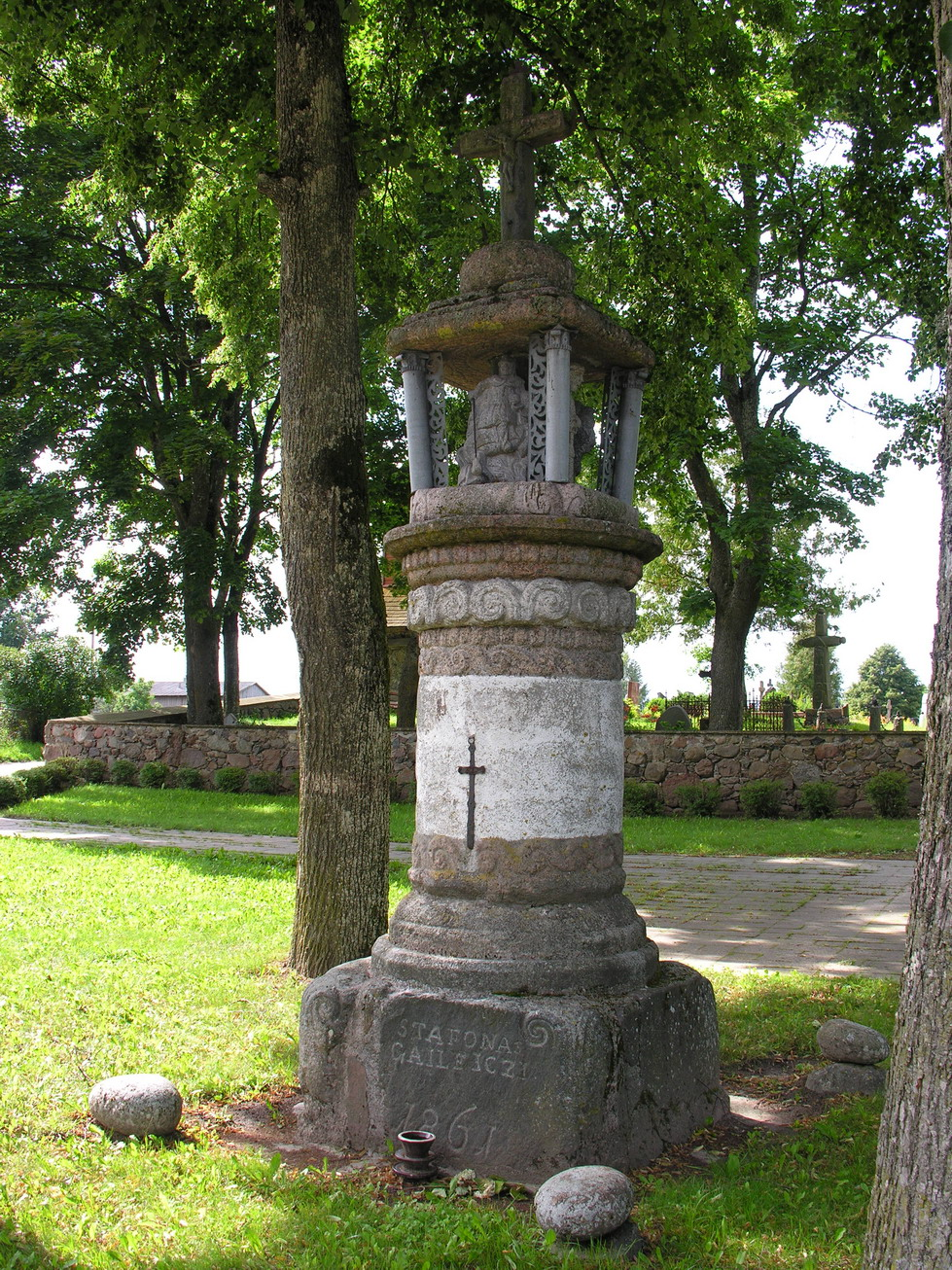 Ukrinų koplytstulpis baudžiavos panaikinimui atminti (past. 1861 m., skulpt. S.Gailevičius), Mažeikių raj. Foto: Algirdas